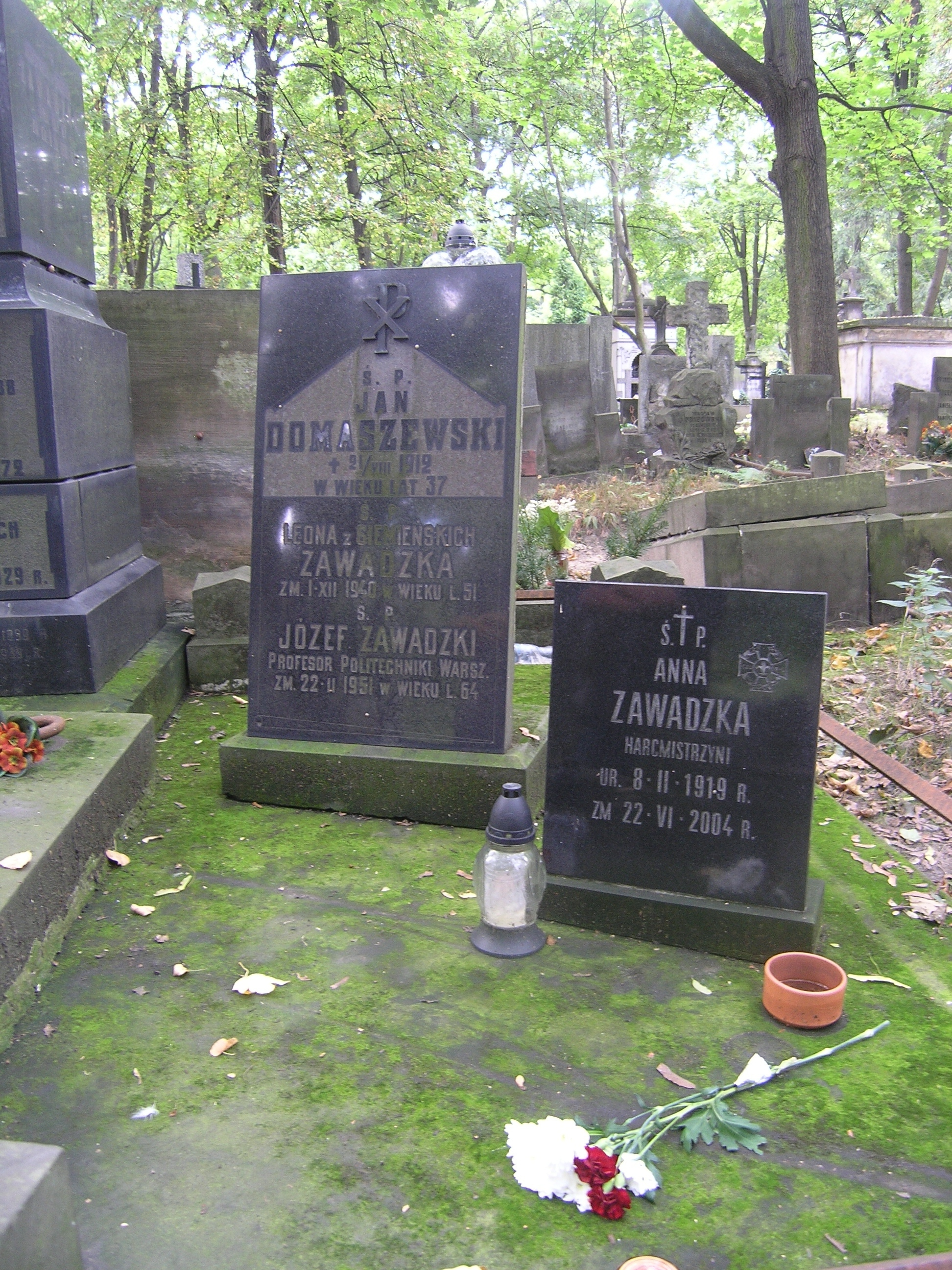 Grób Anny Zawadzkiej na Starych Powązkach